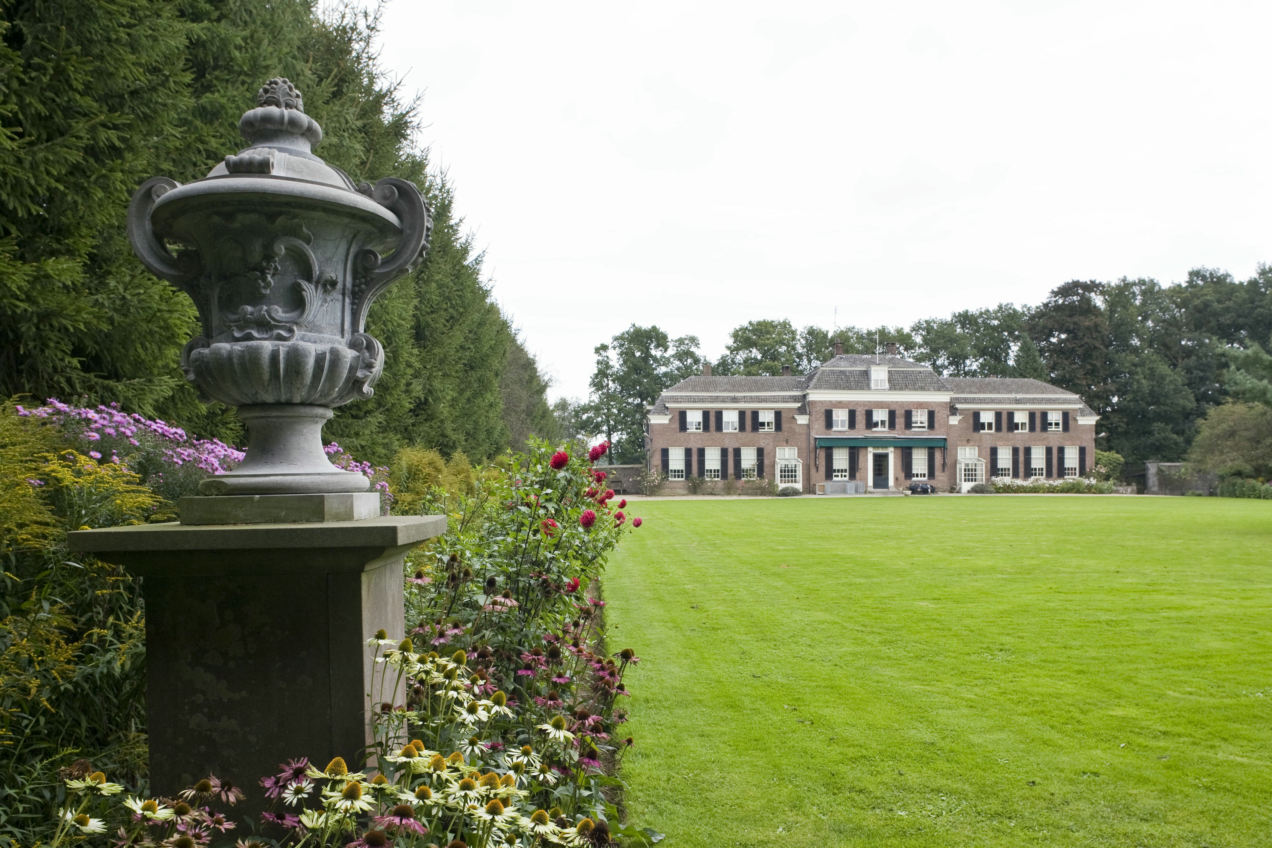 Voormalige orangerie/ Enghuizen: Overzicht van de orangerie in het landschap, met op de voorgrond een tuinvaas (opmerking: Diverse foto-opdrachten. Kiek-2: 1000, 1002, 1003, 1004, 1006, 1007, 1009)